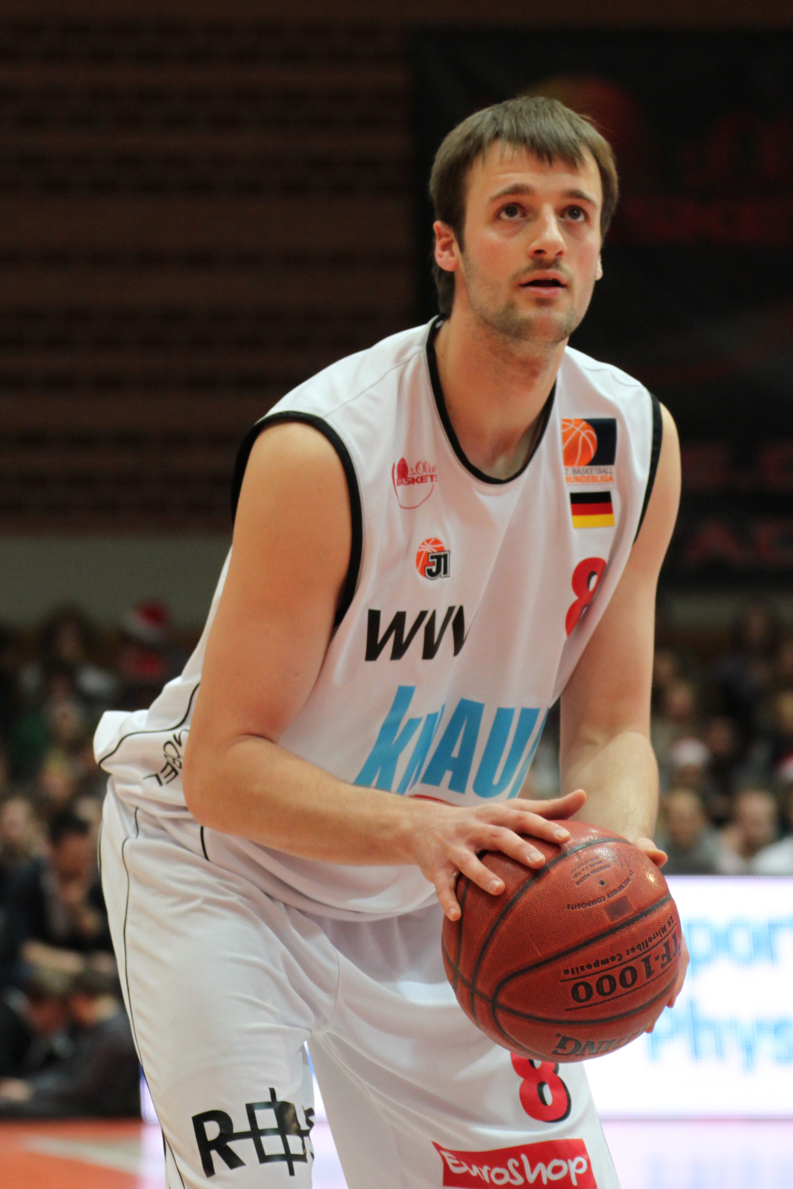 Michael Fleischmann mit dem S.Oliver Baskets